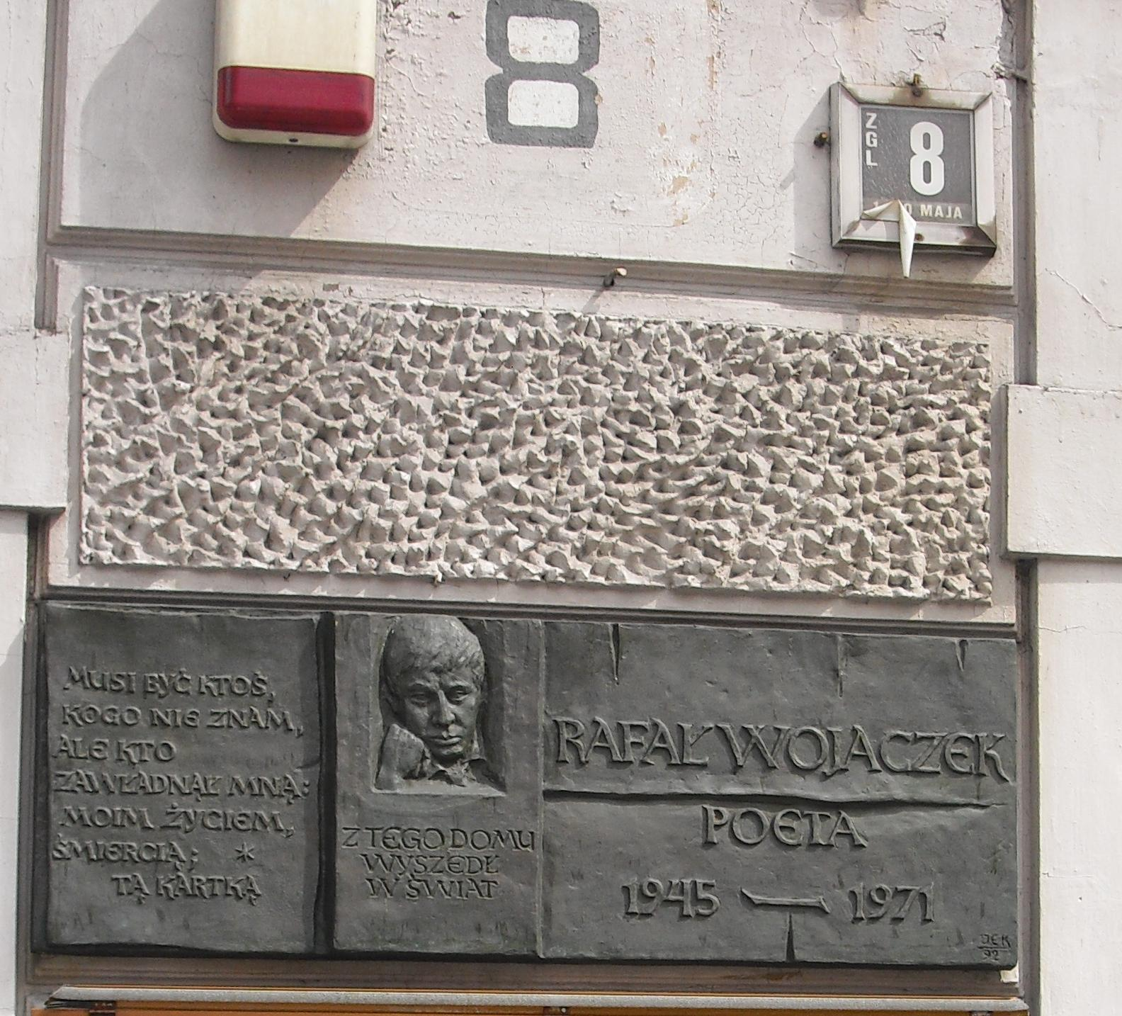 Siedziba Instytutu Mikołowskiego, Mikołów ul. Jana Pawła II 8, tablica poświęcona pamięci Rafała Wojaczka